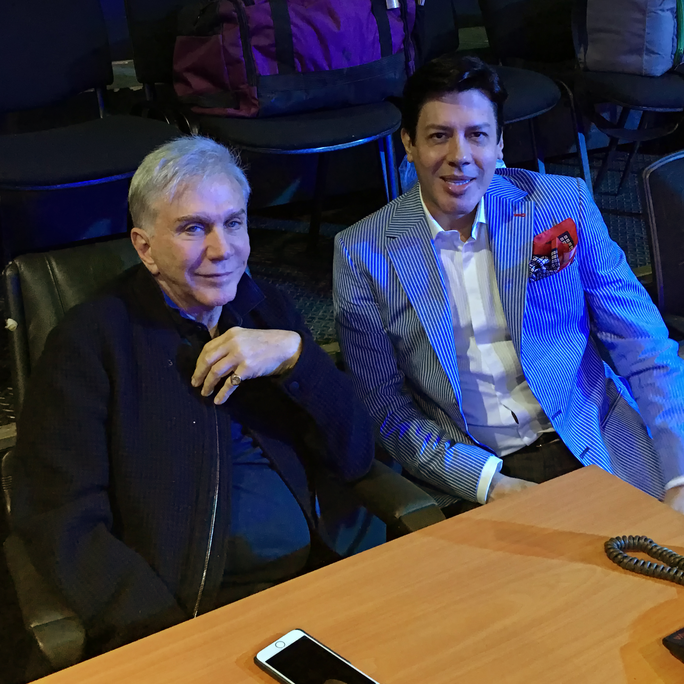 El Zar de la Belleza Osmel Sousa (Izquierda) y el estilista Jesús Morales (Derecha)